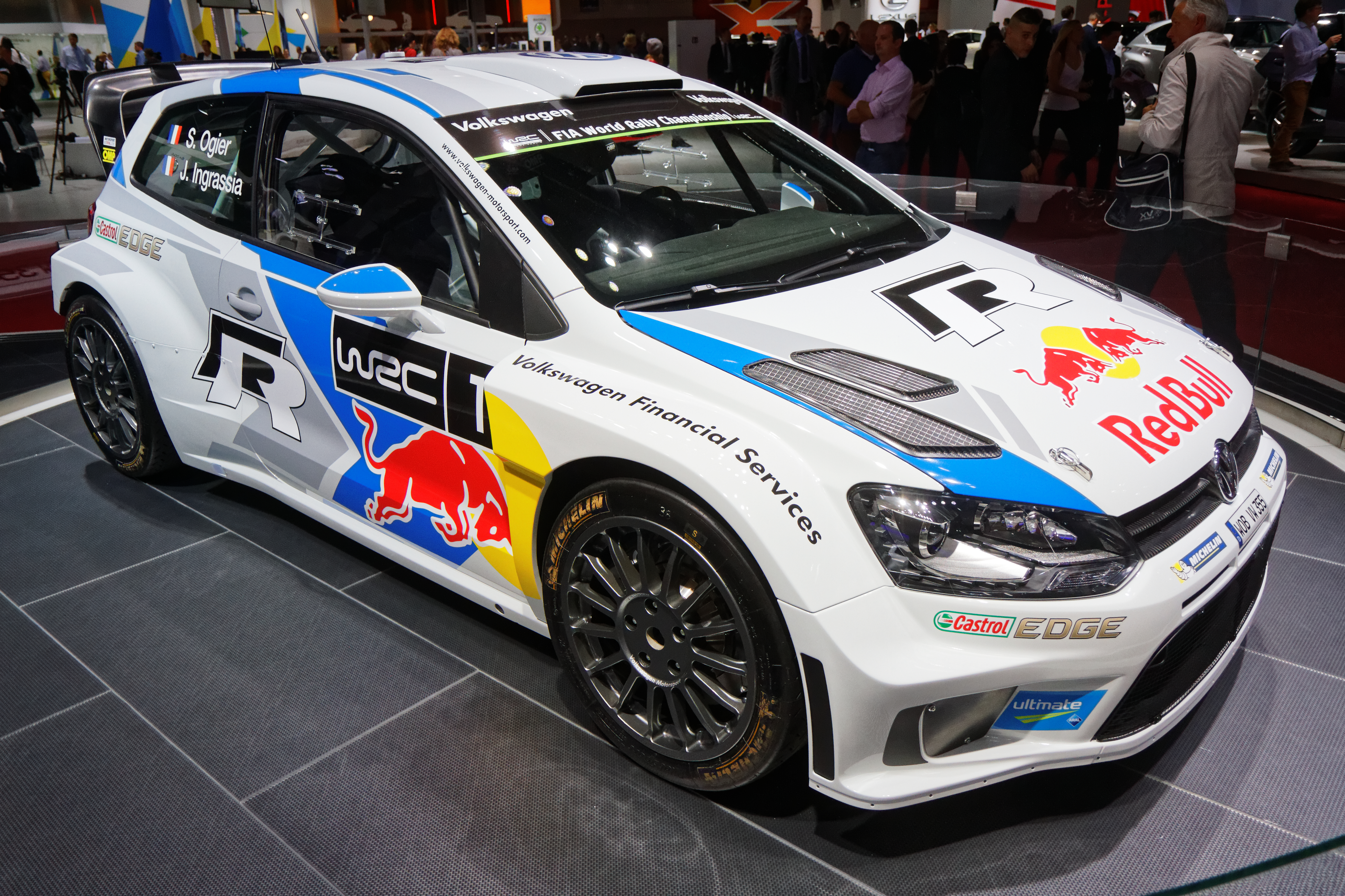 Une Volkswagen Polo R WRC présentée lors du mondial de l'automobile de Paris 2014.